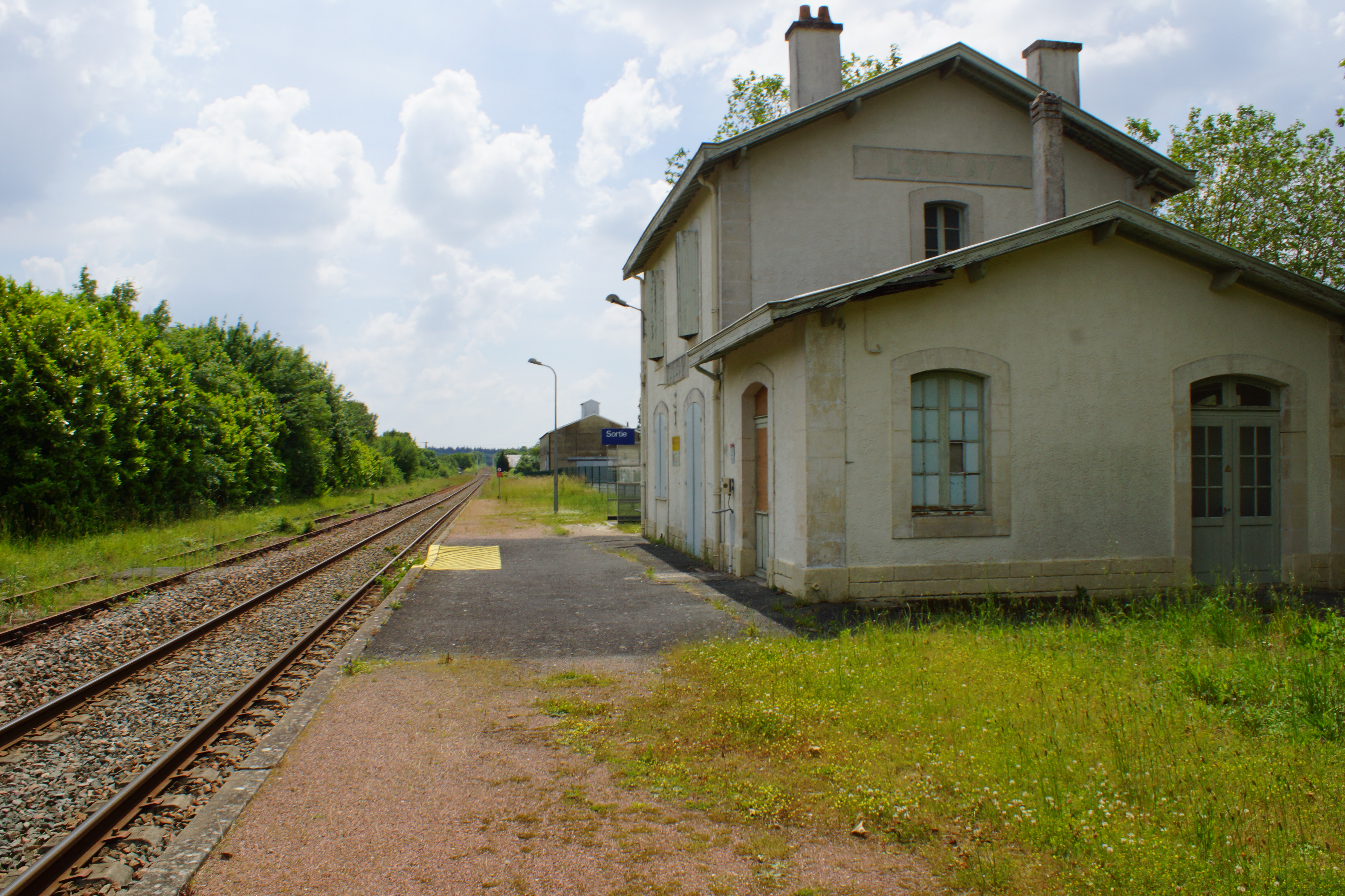 Gare de Loulay : vue de la halte en direction de Saint-Jean-d'Angély, avec la voie, le quai et l'ancien bâtiment voyageurs.